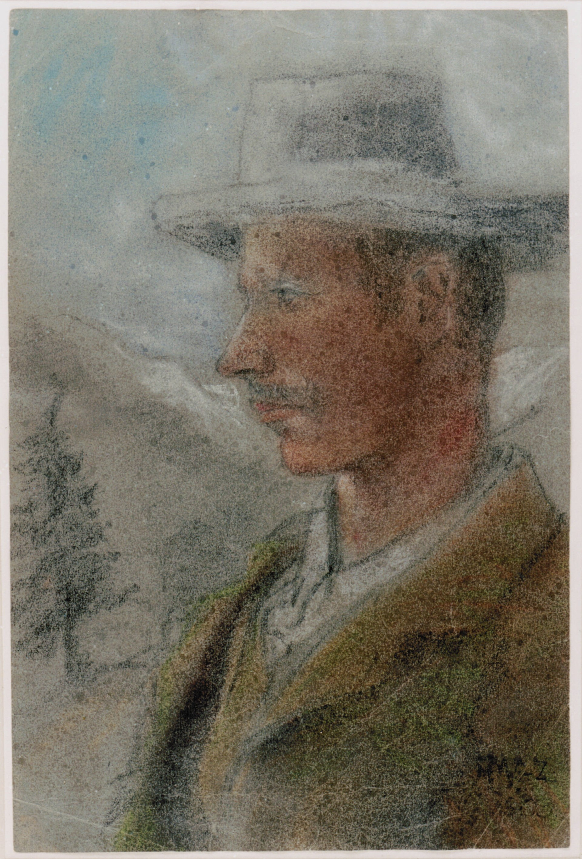 Porträt des Bergführers Josef Lochmatter (1872-1915) von Albert Gos aus dem Jahre 1903, St. Niklaus Schweizer Kanton Wallis.